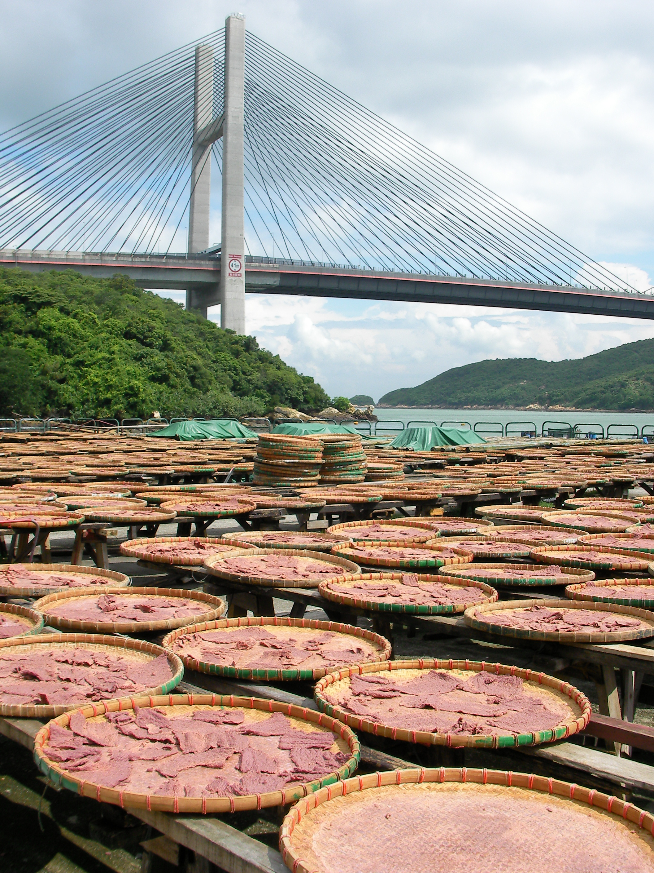 Shrimp paste being dried under the sun, taken in Ma Wan, Hong Kong